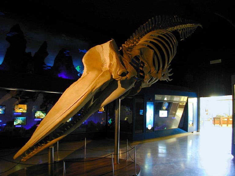 Scheletro di capodoglio, conservato al Museo di storia naturale di Milano